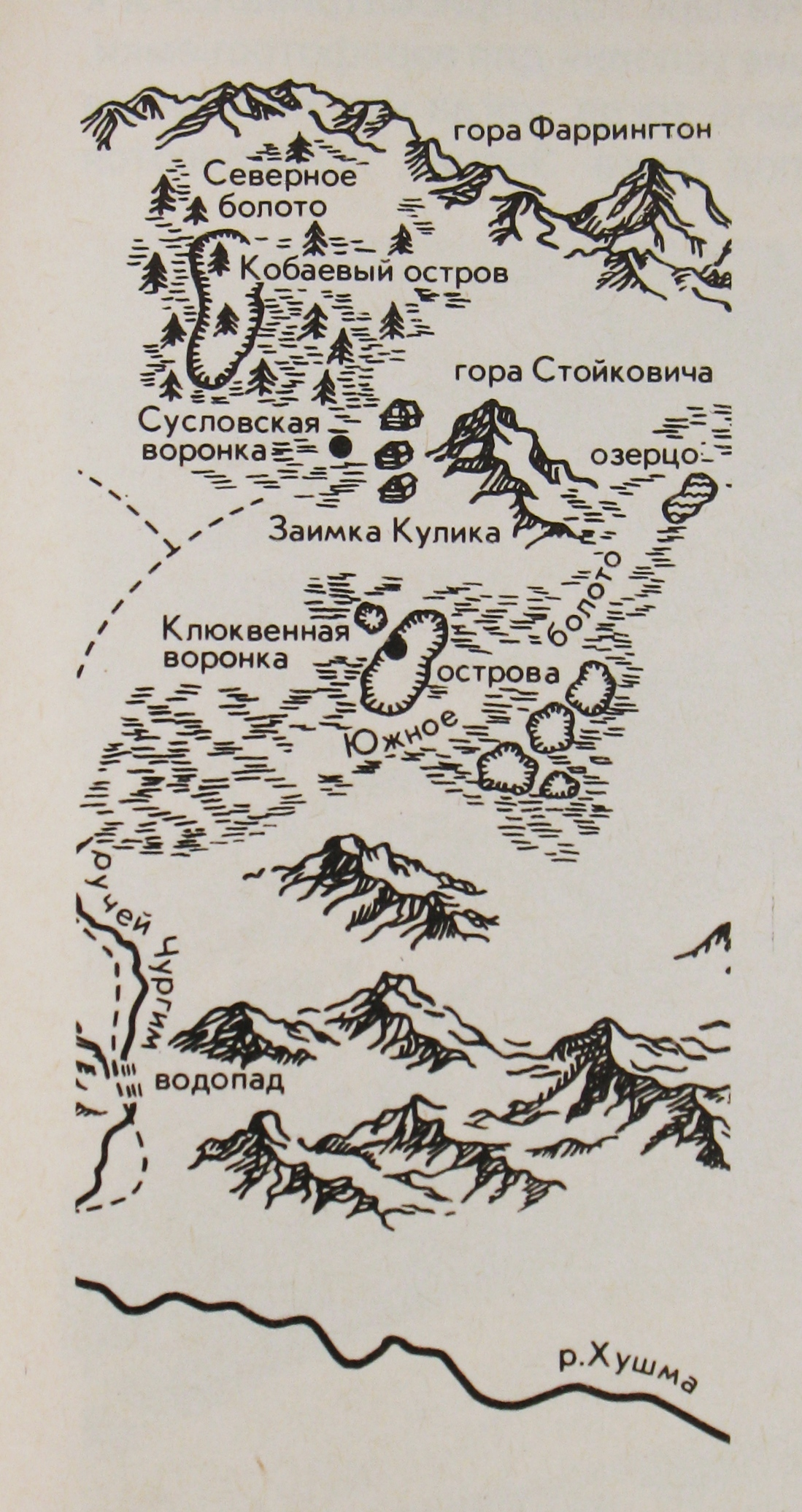 Tunguska meteoroid map.